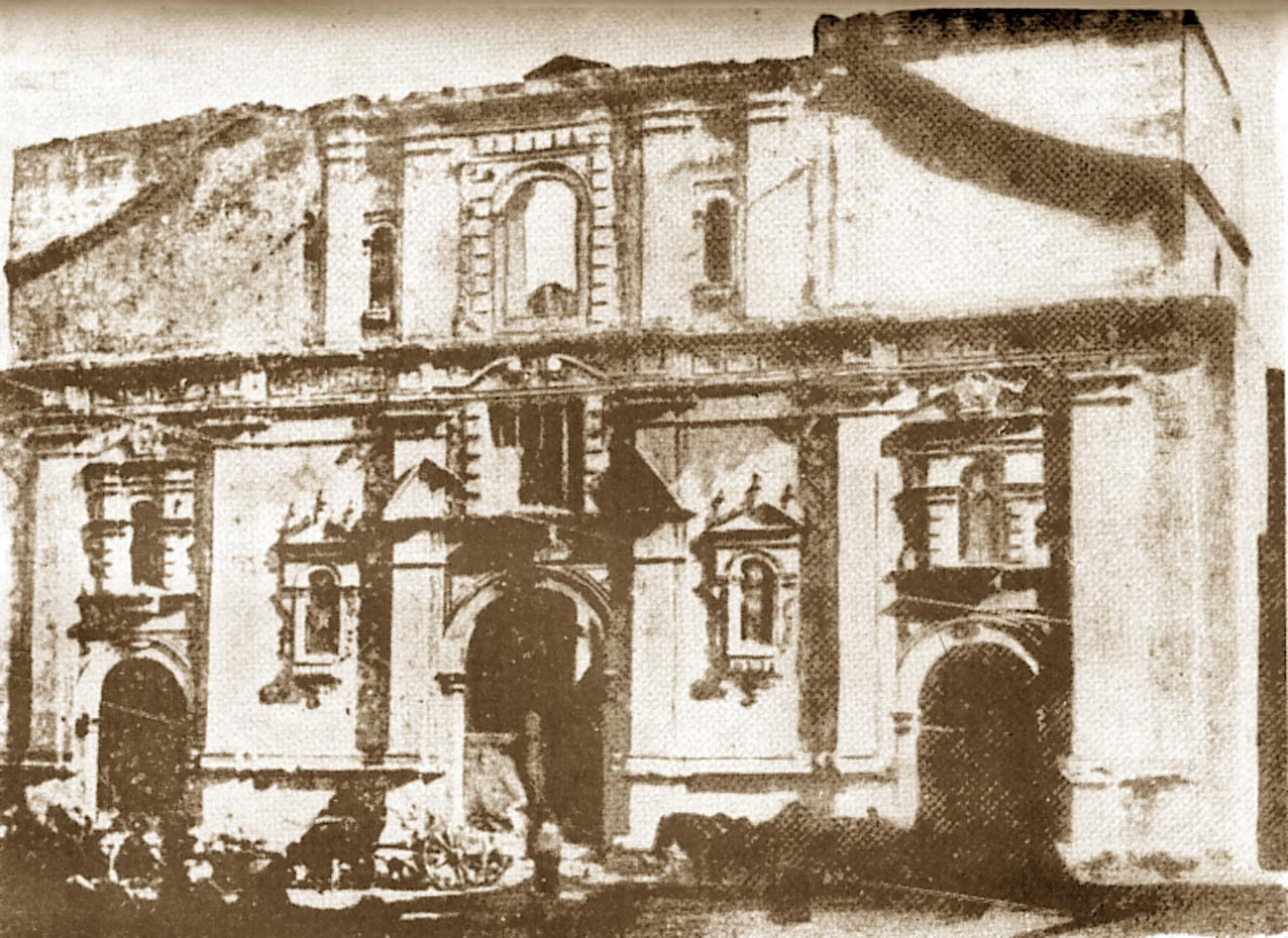 Iglesia de la Compañía después del incendio, ca. 1863 (Santiago de Chile Carretas retirando los cuerpos calcinados. Fotografía publicada por C. Peña Otaegui en "Santiago de siglo en siglo" (1944).)